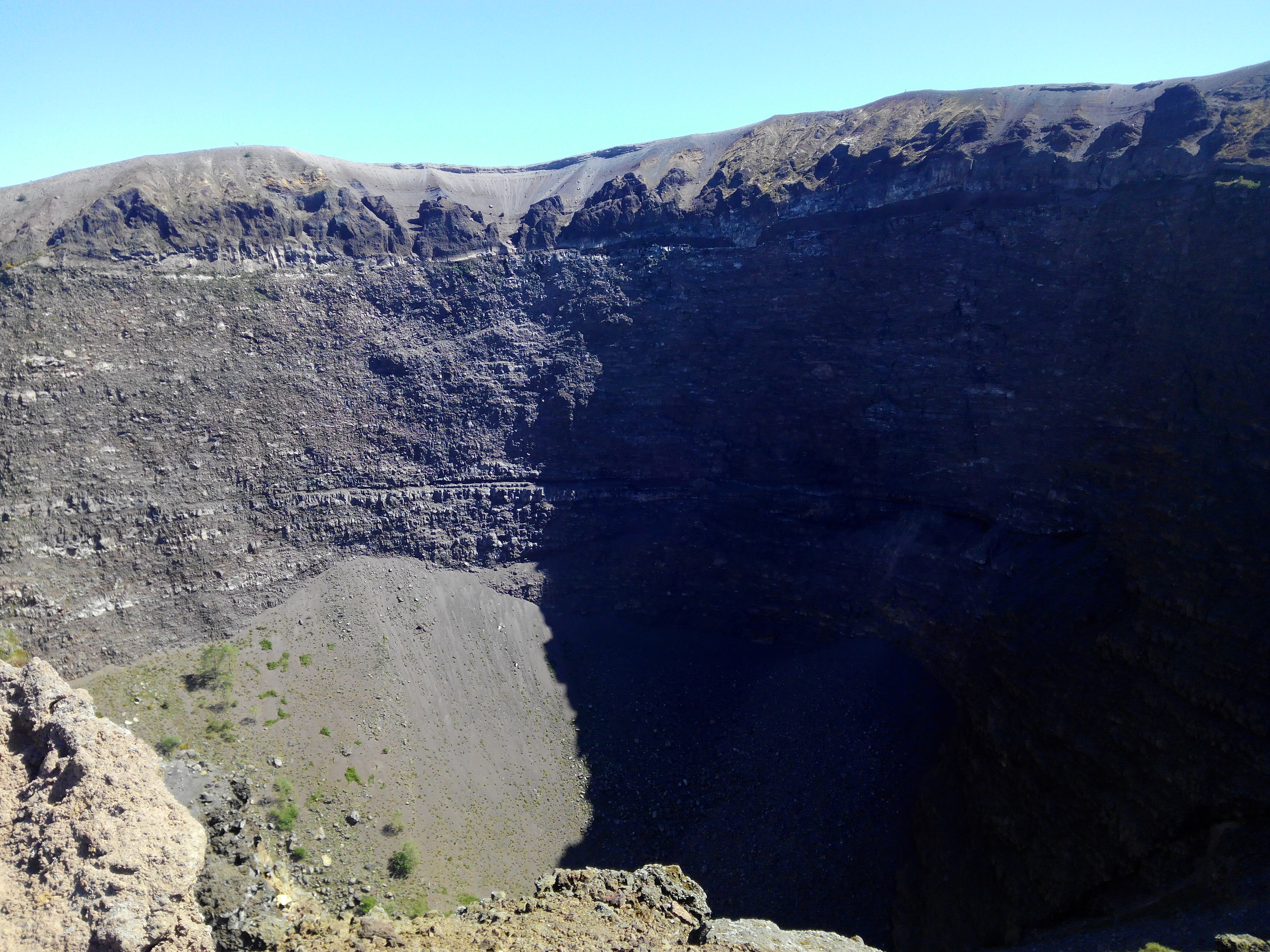 Parte interior del cráter del volcán Vesubio, Italia.